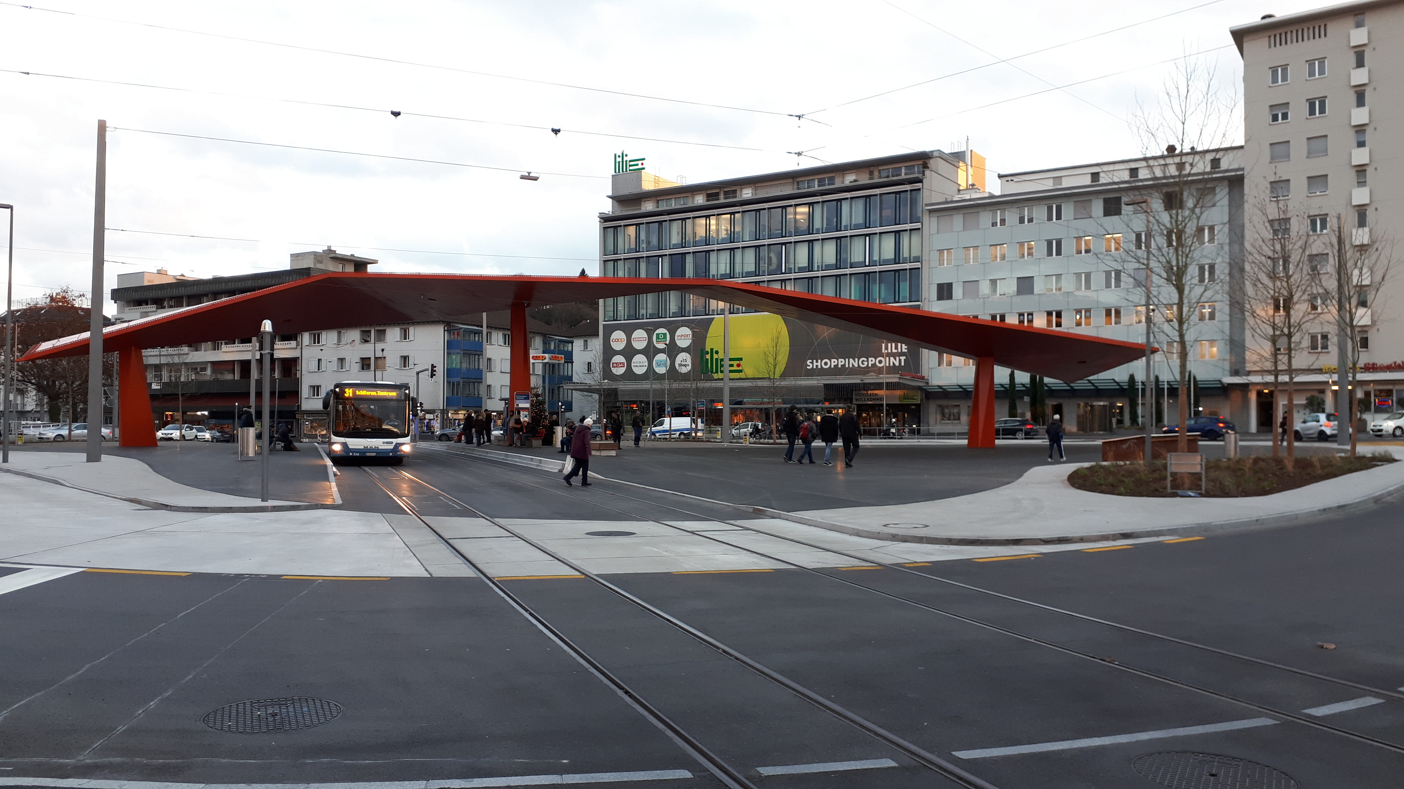 Stadtplatz Schlieren nach Fertigstellung der Hauptbauarebeiten der LTB. VBZ Linie 31 befährt provisorisch das LTB-Trassee. Es fehlt noch die Fahrleitung sowie sind noch Fertigstellungsarbeiten am Gleisoberbau im Gang.